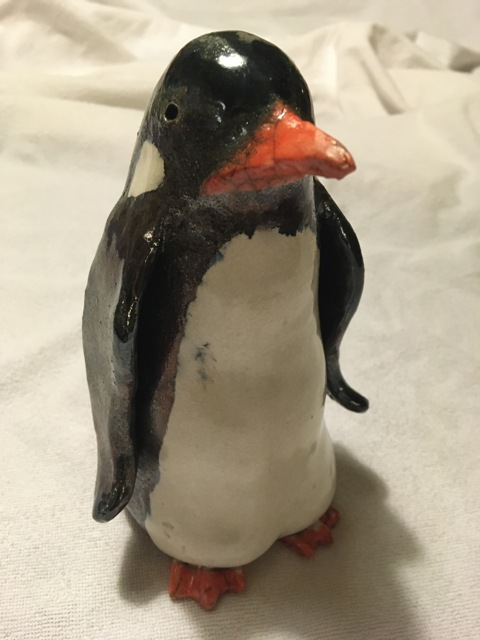 En pingvinskulptur